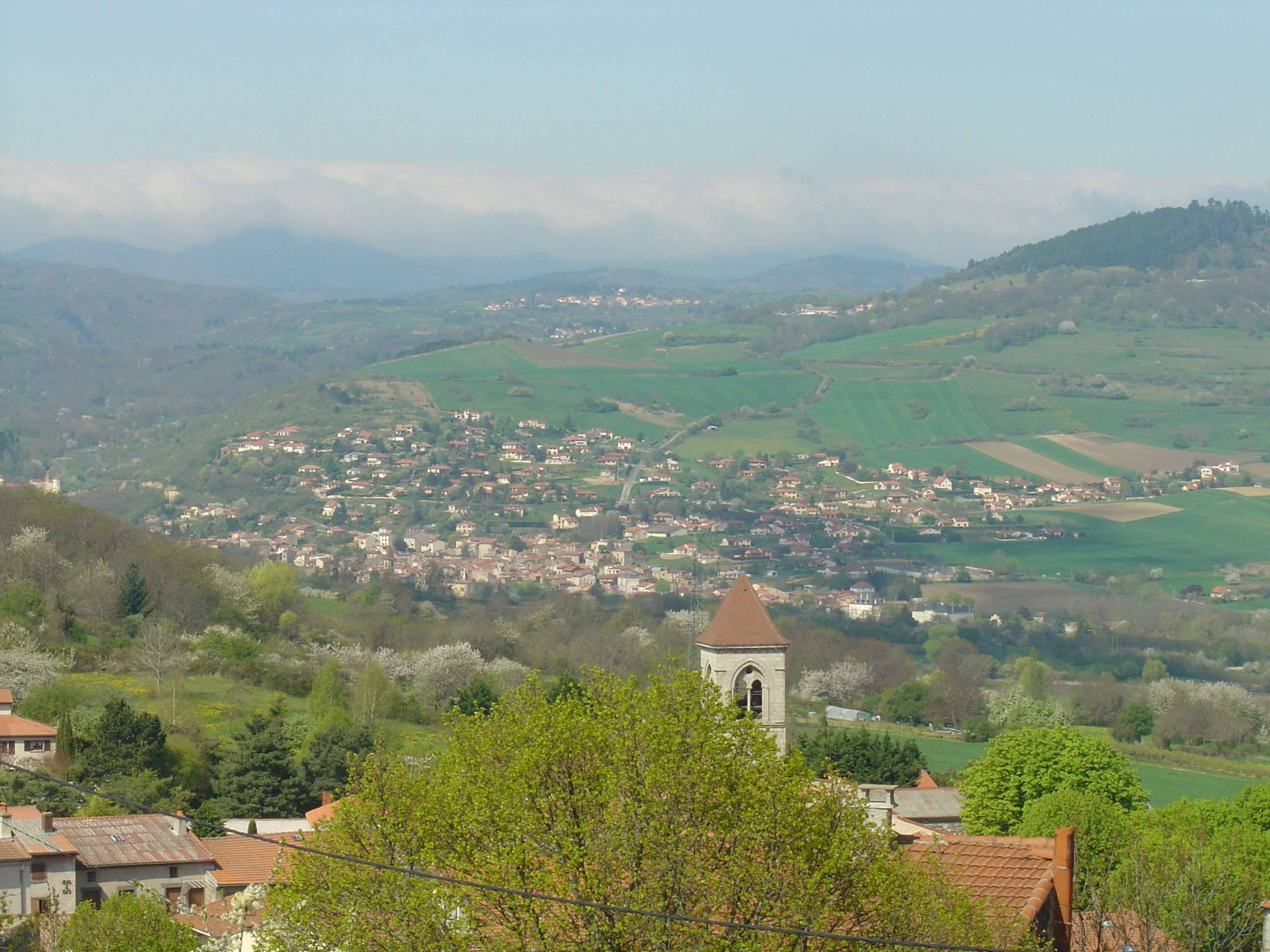 Vue générale de Chanonat depuis la table d'orientation de Le Crest. Auvergne- Puy-de-Dôme